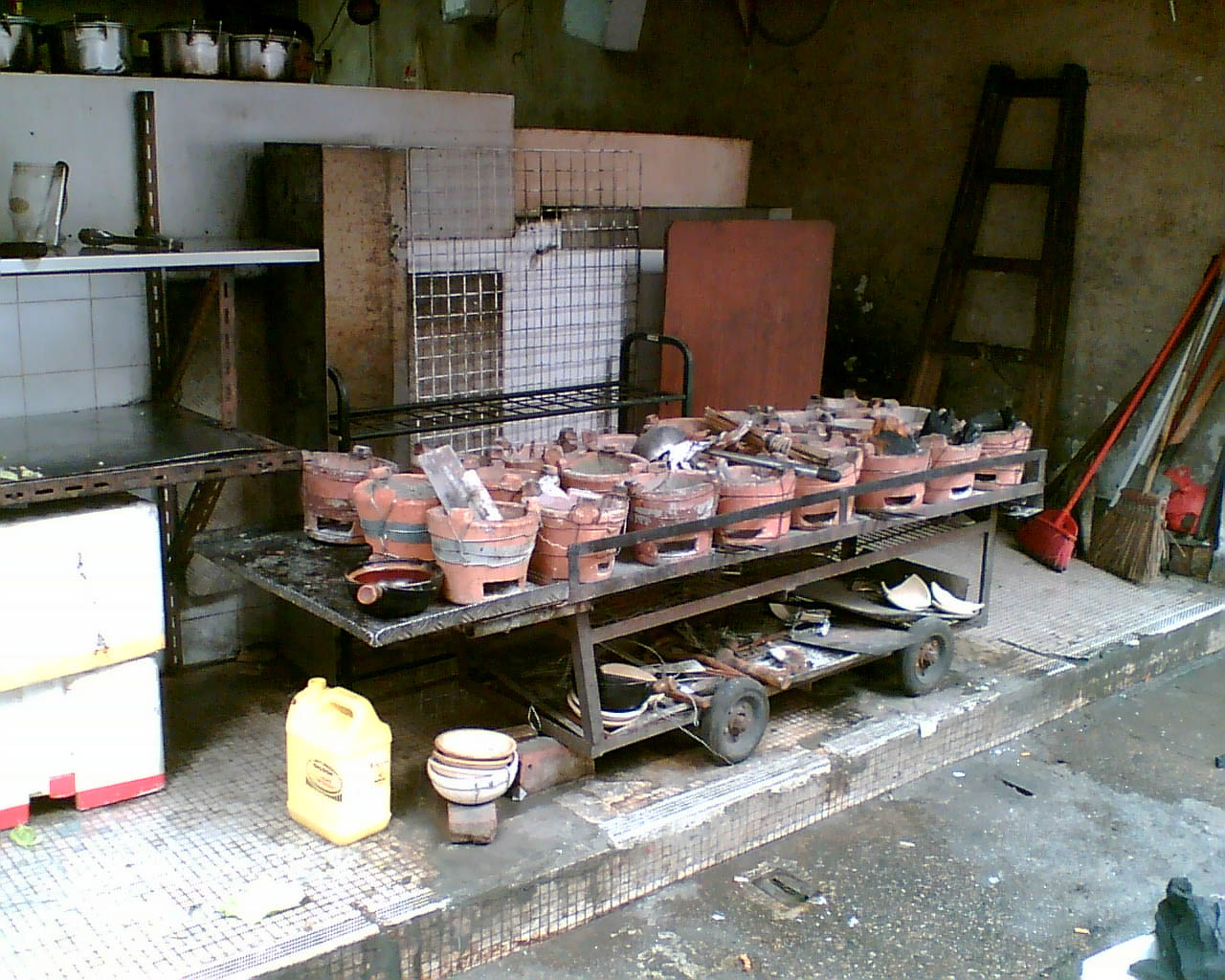 廟街起炭爐造煲仔飯